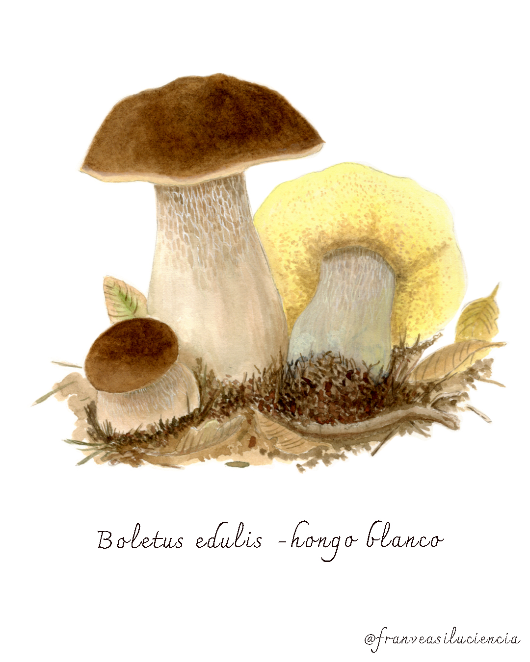 Ilustración botánica, técnica acuarela